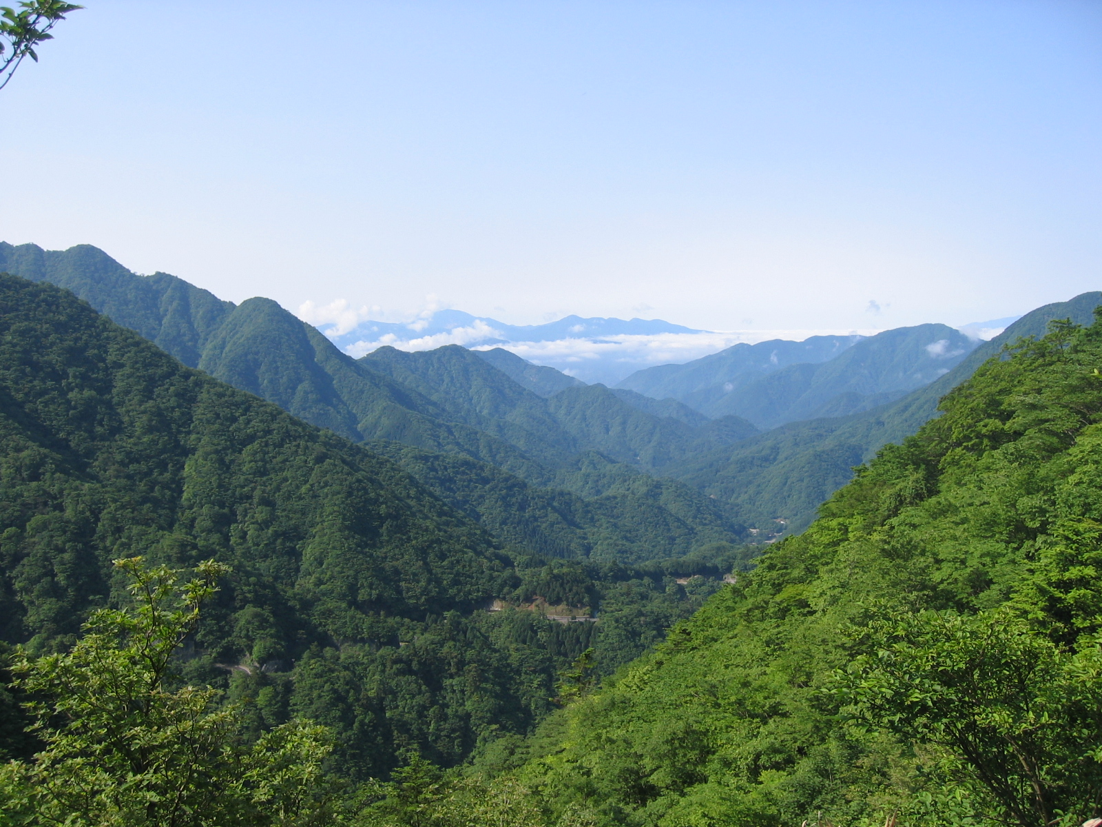 犬越路からの眺め